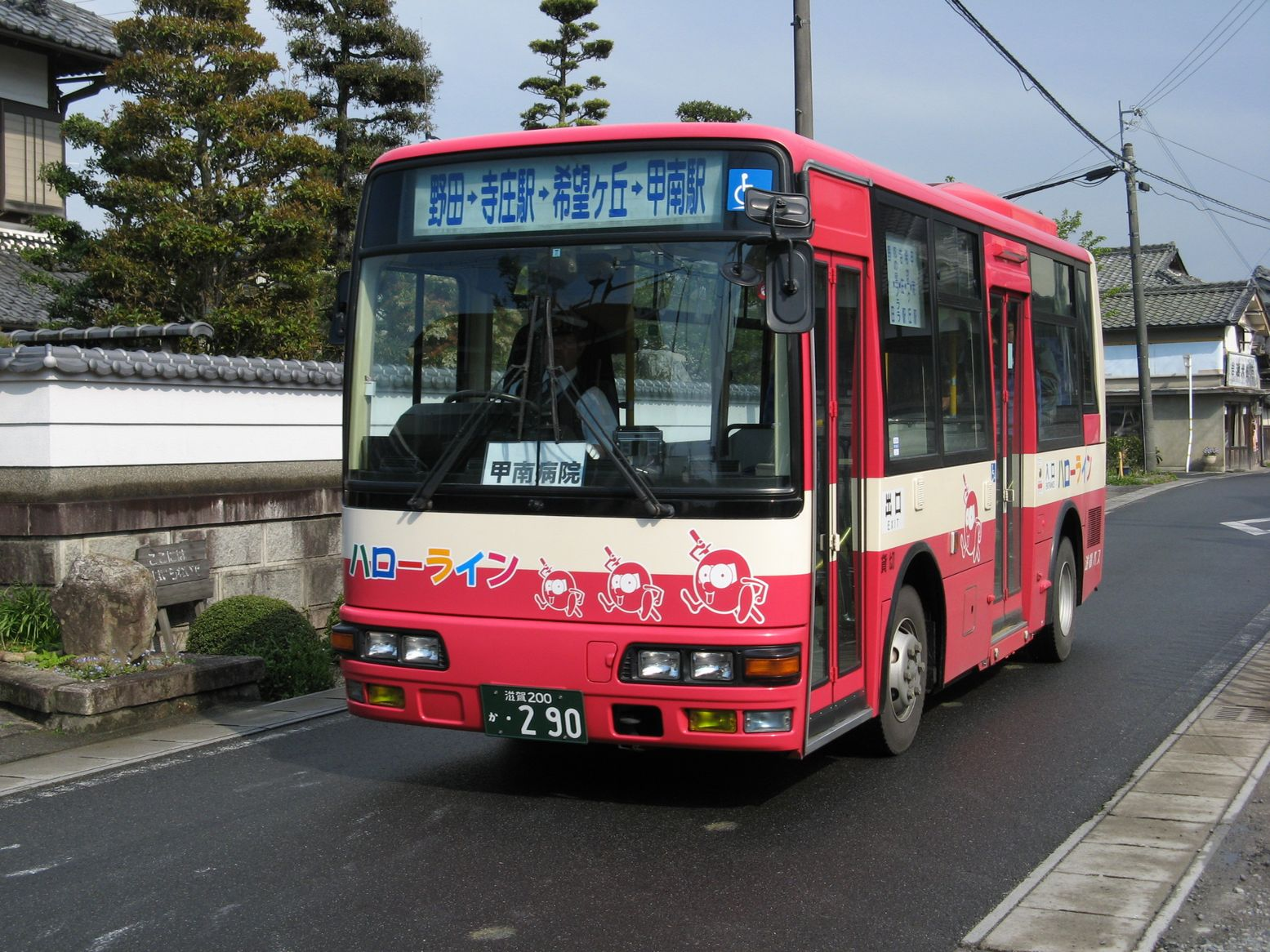 甲賀市コミュニティバス ハローライン